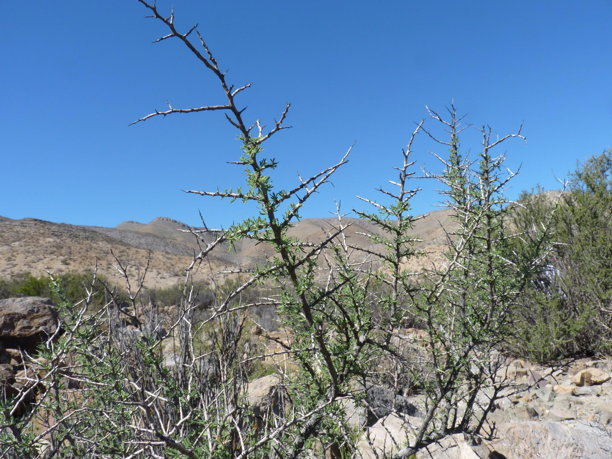 Solanaceae - Lycium minutifolium J. Remy3